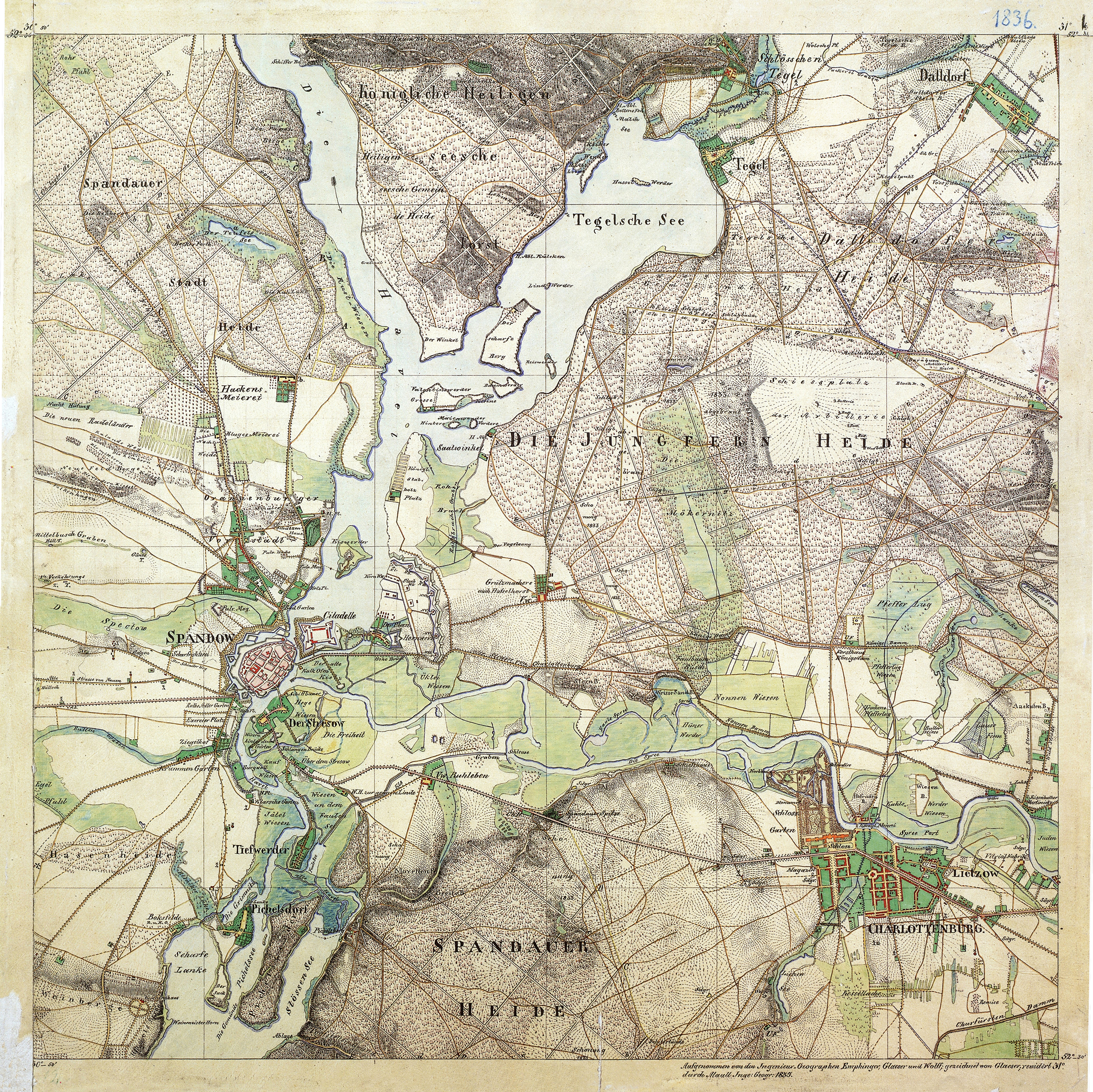 Unter dem Plan steht: "Aufgenommen von den Ingenieur-Geographen Emphinger, Glaeser und Wolff; gezeichnet von Glaeser; revidiert durch Maull Inge:[nieur] Geogr:[aph] 1835."